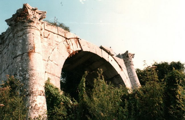 Arco trionfale romano di Aquinum